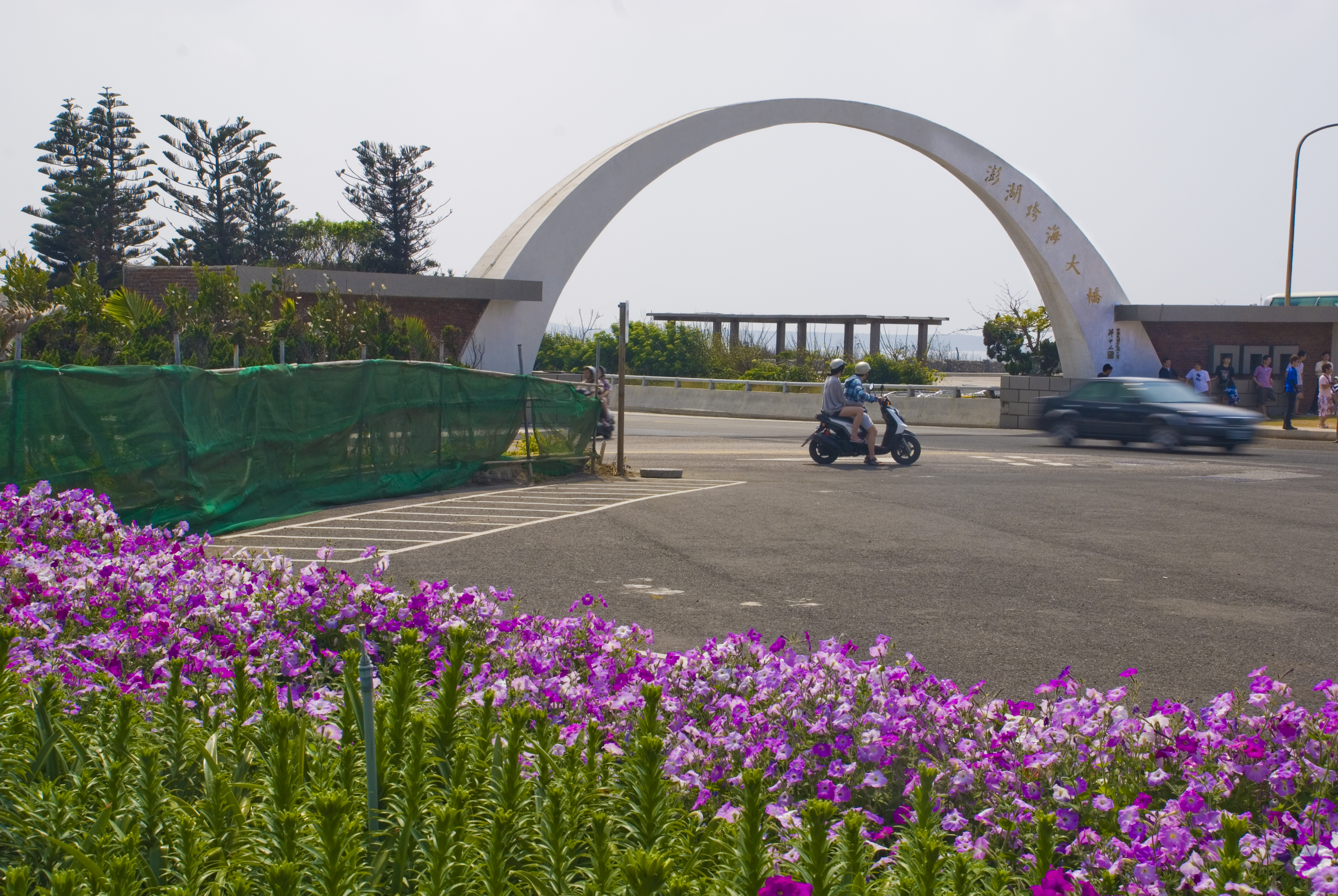 中文（台灣）: 澎湖跨海大橋全長2,494公尺，橫跨白沙、西嶼兩島之間的吼門水道，水流湍急，流速據說可達每秒3公尺。每當秋冬季東北季風來臨，更是怒濤洶湧，難以行船，因此，1965年始建跨海大橋，1970年完工通車，以解決漁翁島往來的交通困境。後因橋樑腐蝕嚴重與橋梁坍蹋，於1984年拓寬陸堤，1996年完工通車成為雙車道新橋。 遠望如海上長虹的跨海大橋不但具觀光價值，也讓西嶼和白沙兩地交通暢通無阻。